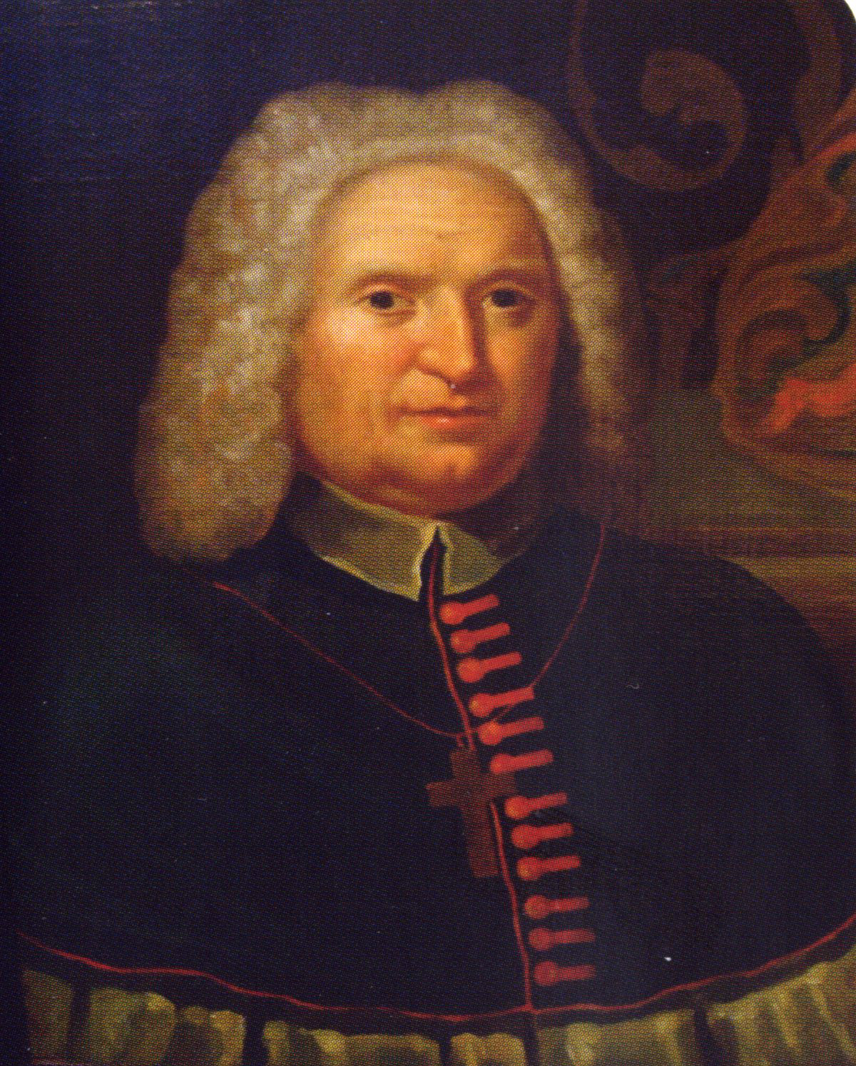 portret van Theodorus van der Croon (1868-1739), oudkatholieke aartsbisschop van Utrecht